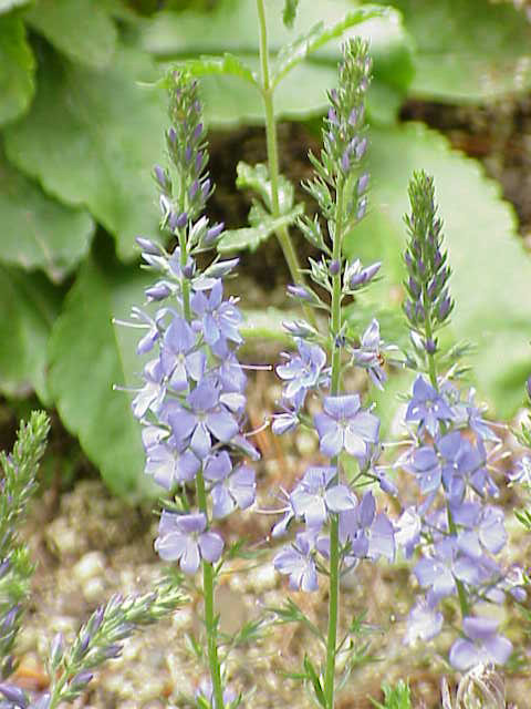 Species: 'Veronica austriaca subsp. austriaca' Family: Scrophulariaceae Image No. 1